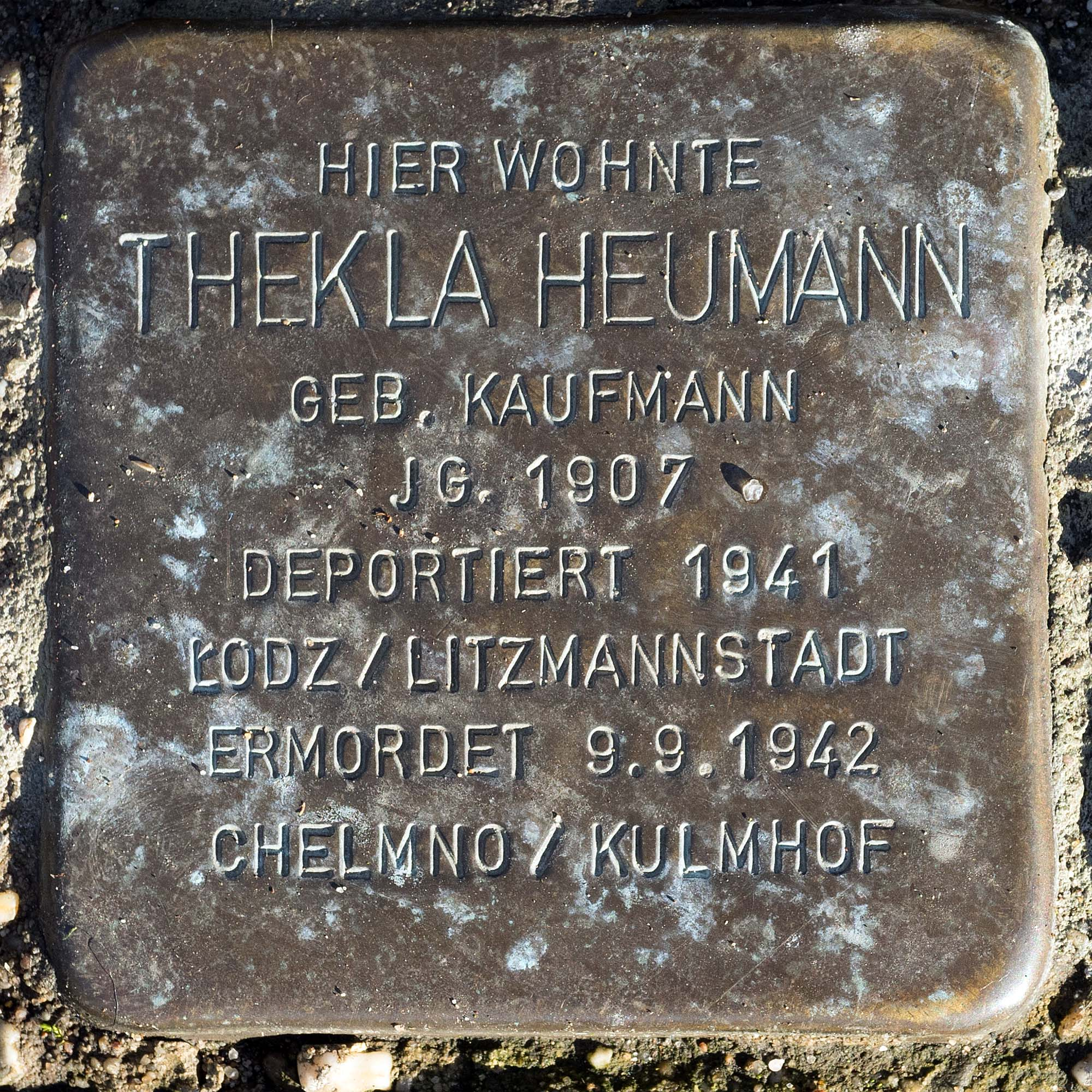 Stolperstein für Kaufmann Thekla